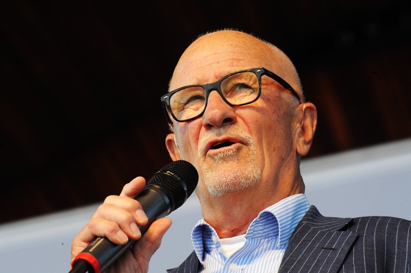 Bosse Larsson at Taubedagen, Soliden, Stockholm.